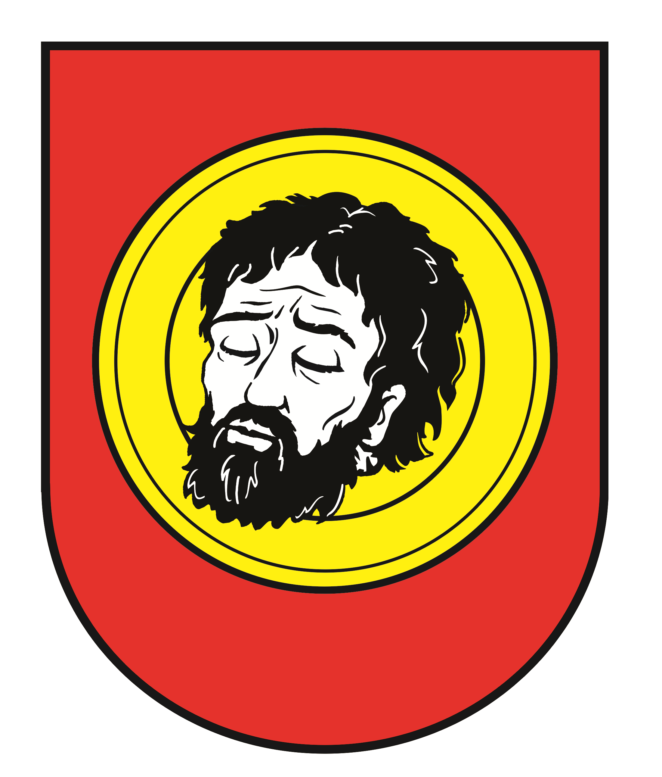 herb Proszowic św. Jan